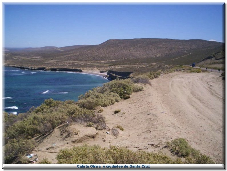 Playa La Tranquera